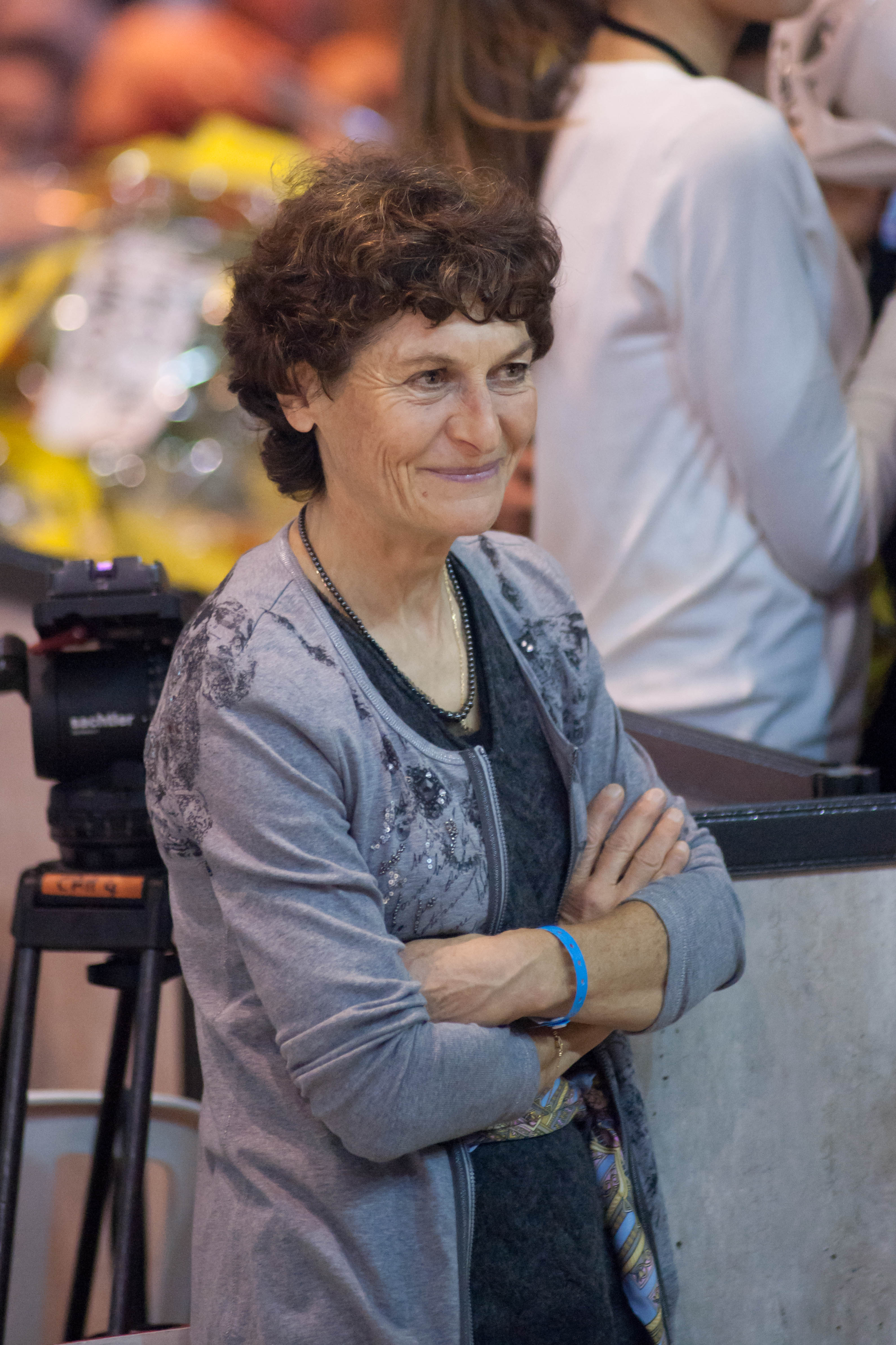 Jeannie Longo lors des 6 jours de Grenoble